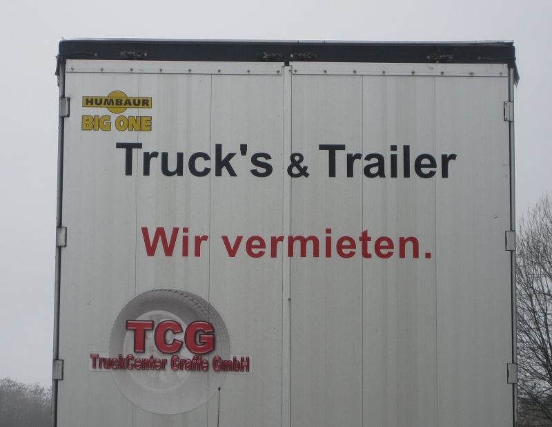 Lastwagenaufschrift mit falschem Apostroph